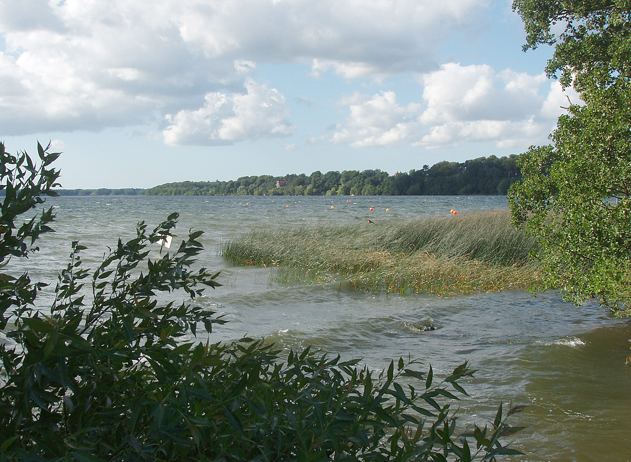 Furesøen set fra den sydlige ende ved Frederiksdal. Furesø